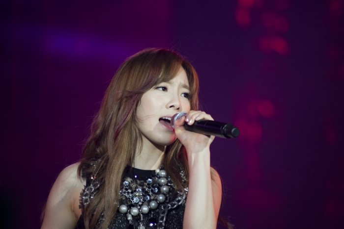 2012년 7월 12일 여수 엑스포 팝 페스티벌에서 태연.